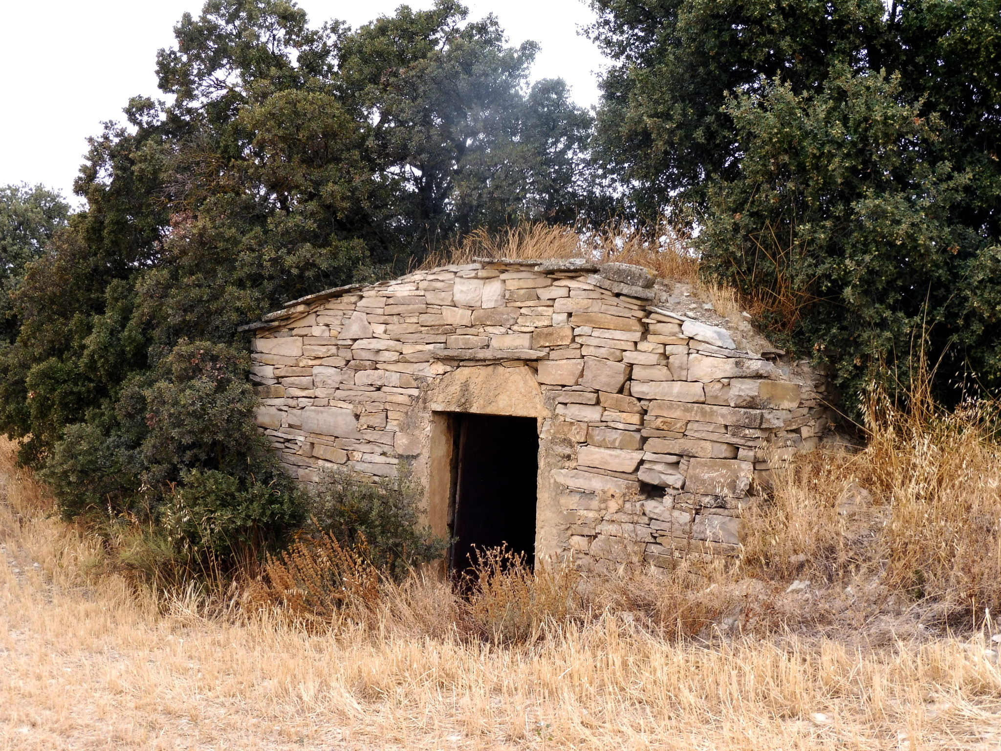 Cabana de volta del Josep del Comte (Granyena de Segarra) This is a a photo of a natural area in Catalonia, Spain, with id: ES510254